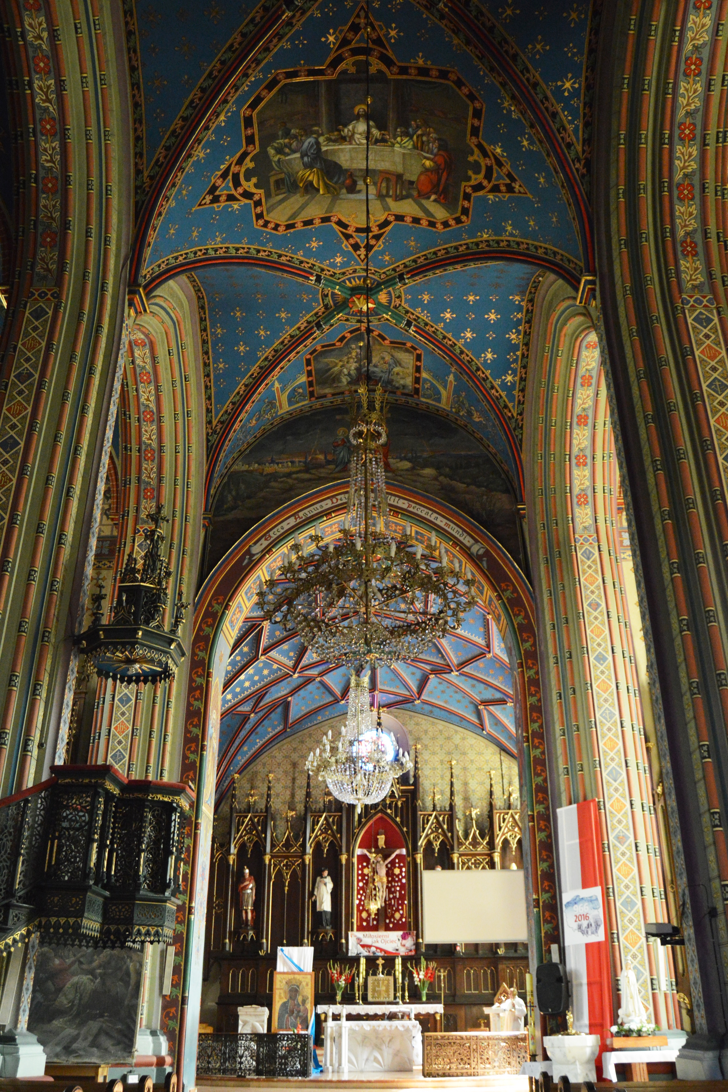 wnętrze kościoła Podwyższenia Krzyża Świętego w Kole